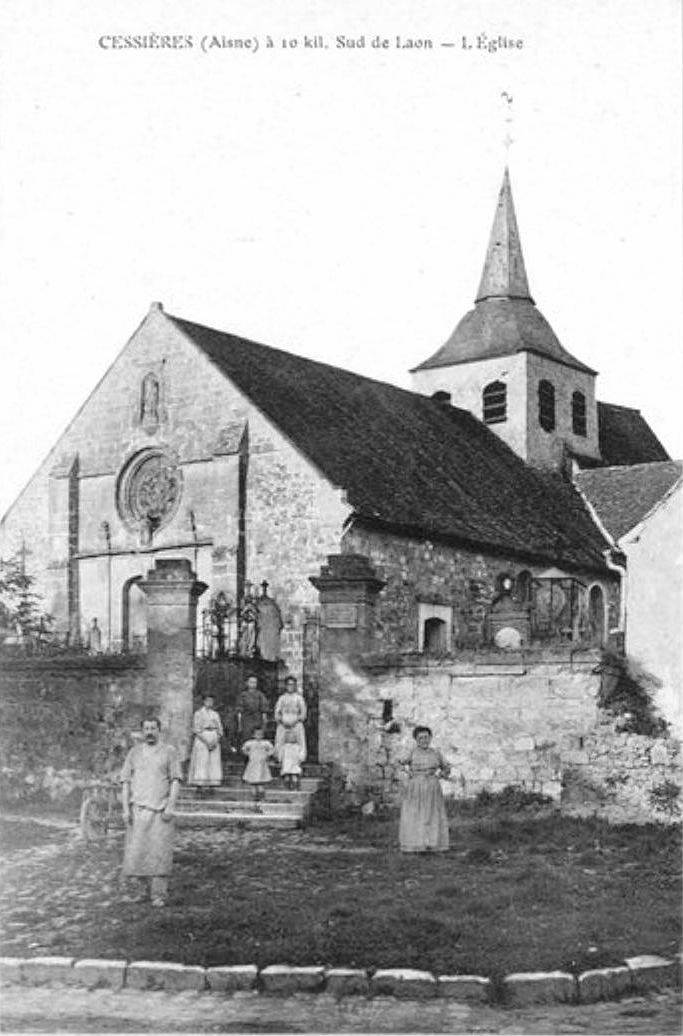 l'église.